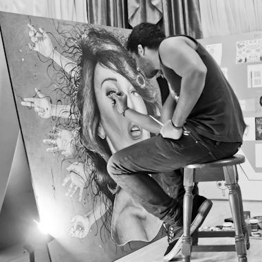 Pintando